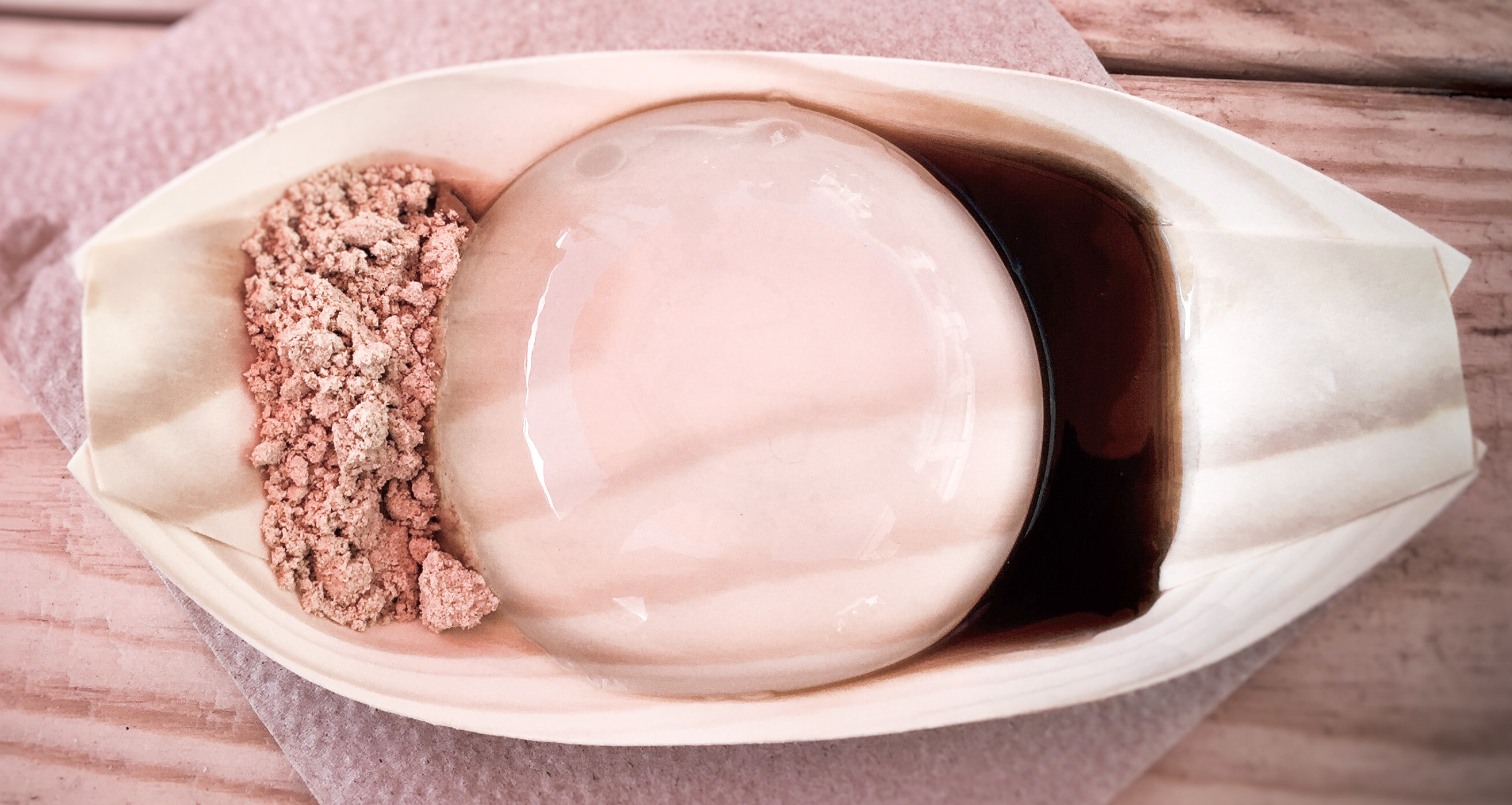 Raindrop Cake, Los Angeles CA